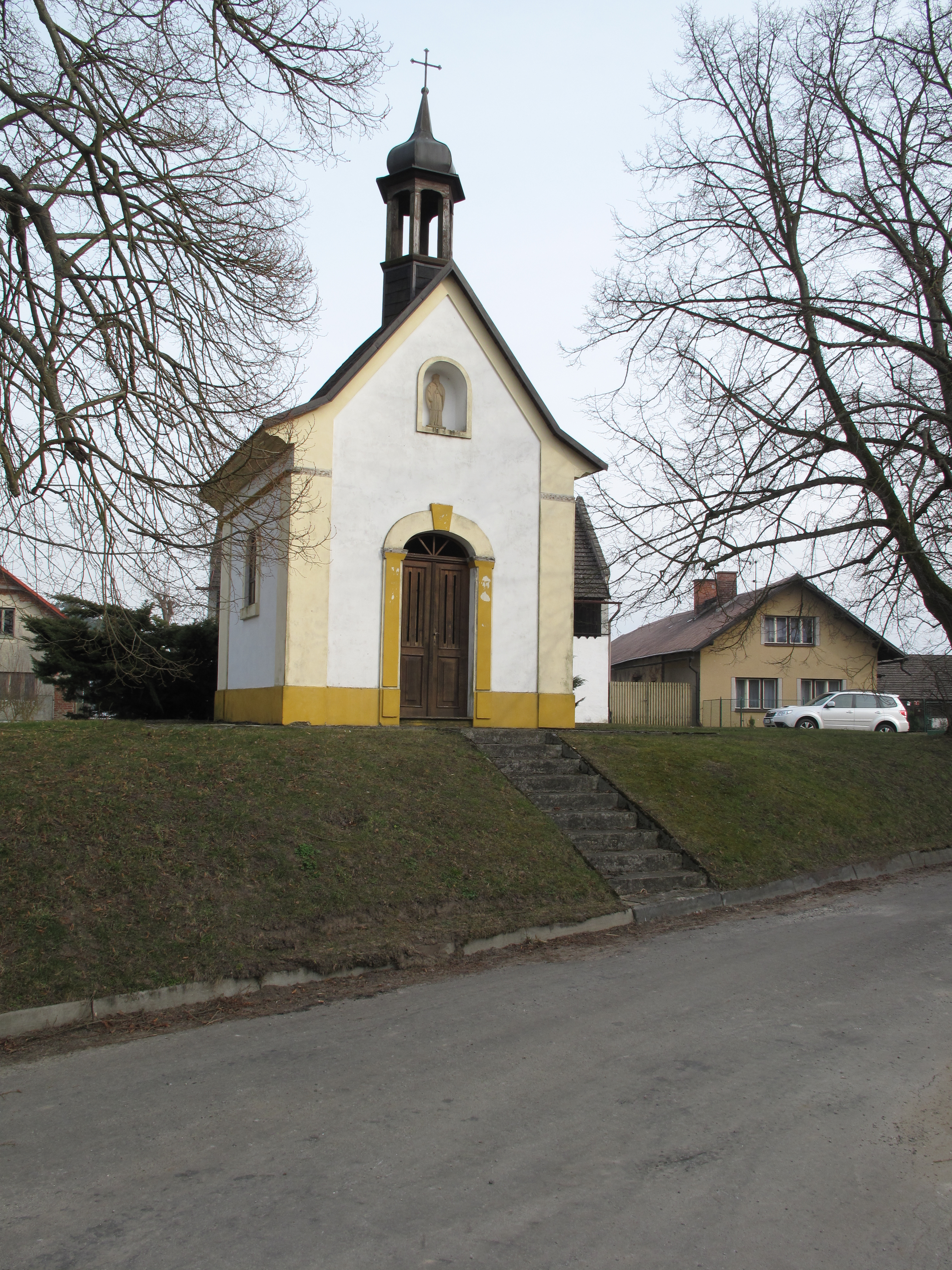 Kaplička v Ouči. Okres Mladá Boleslav, Česká republika.